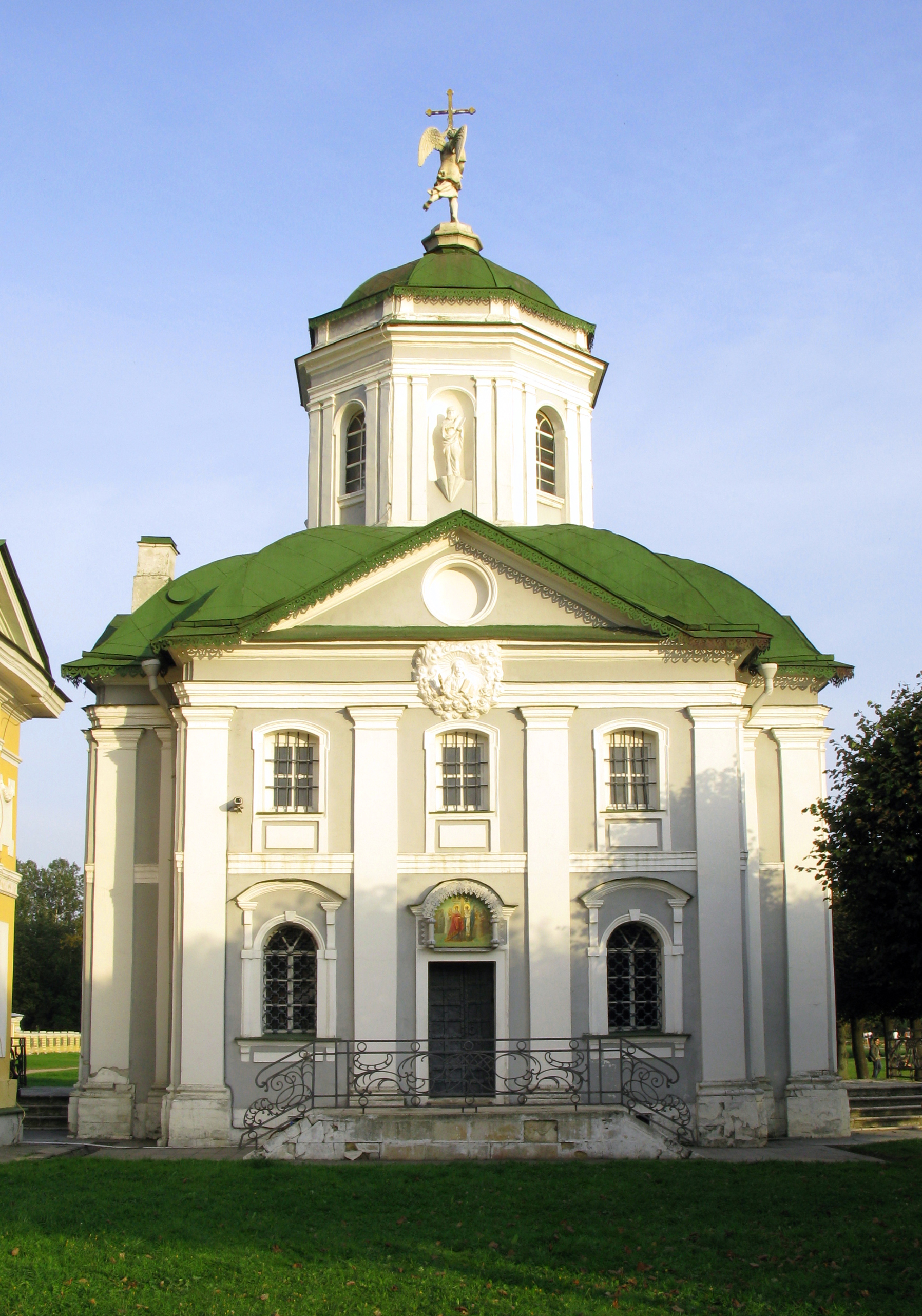 Церковь Спаса Всемилостивого в Кускове